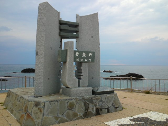 「波濤の門」